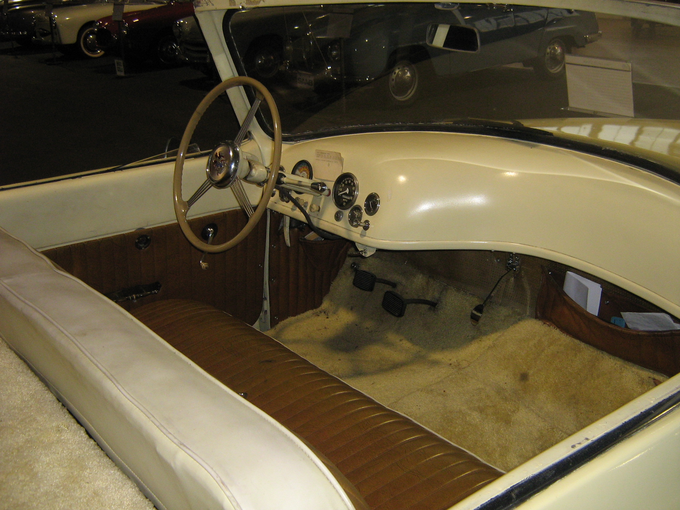 1948 Davis